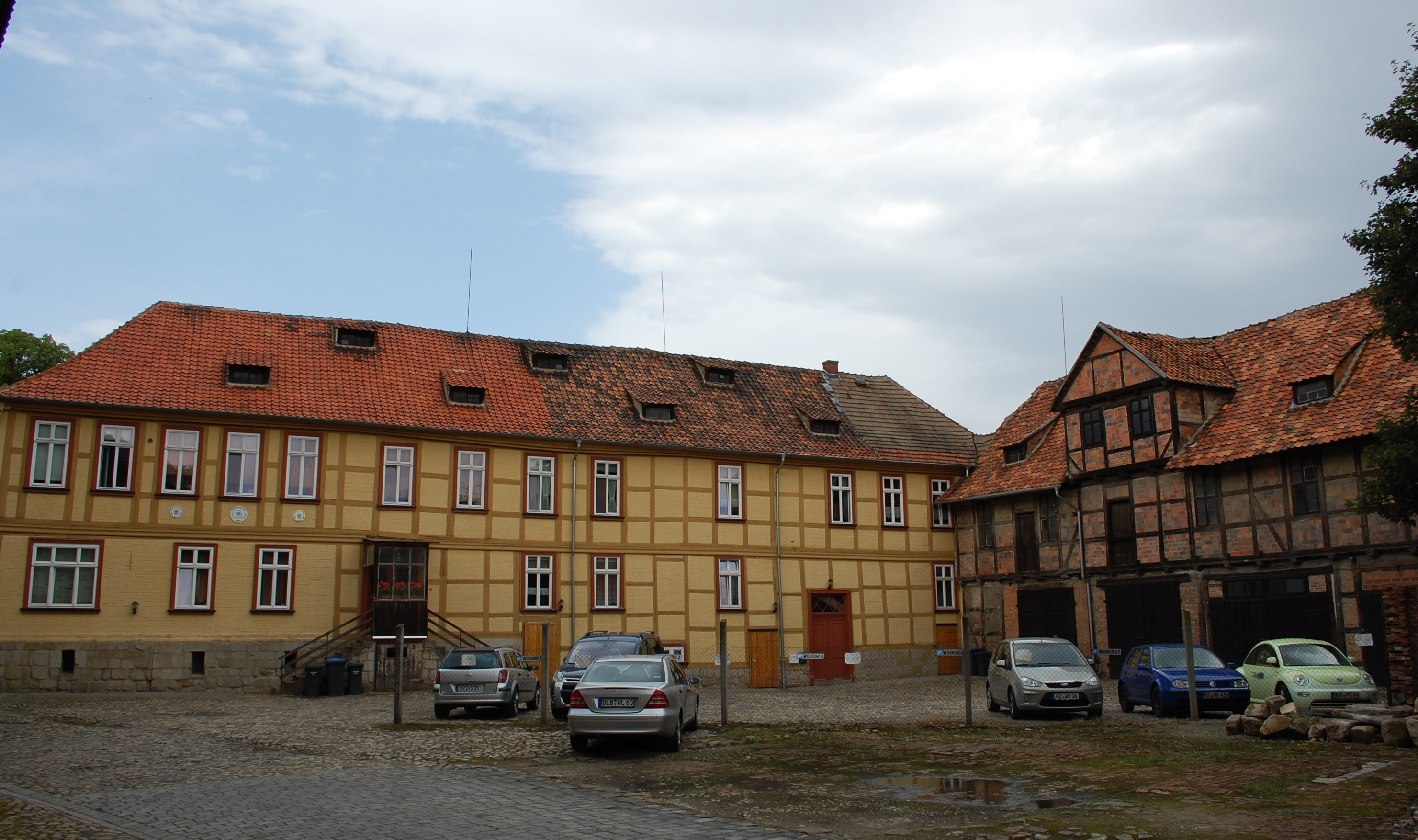 Haus Am Schiff Bleek 4 in Quedlinburg